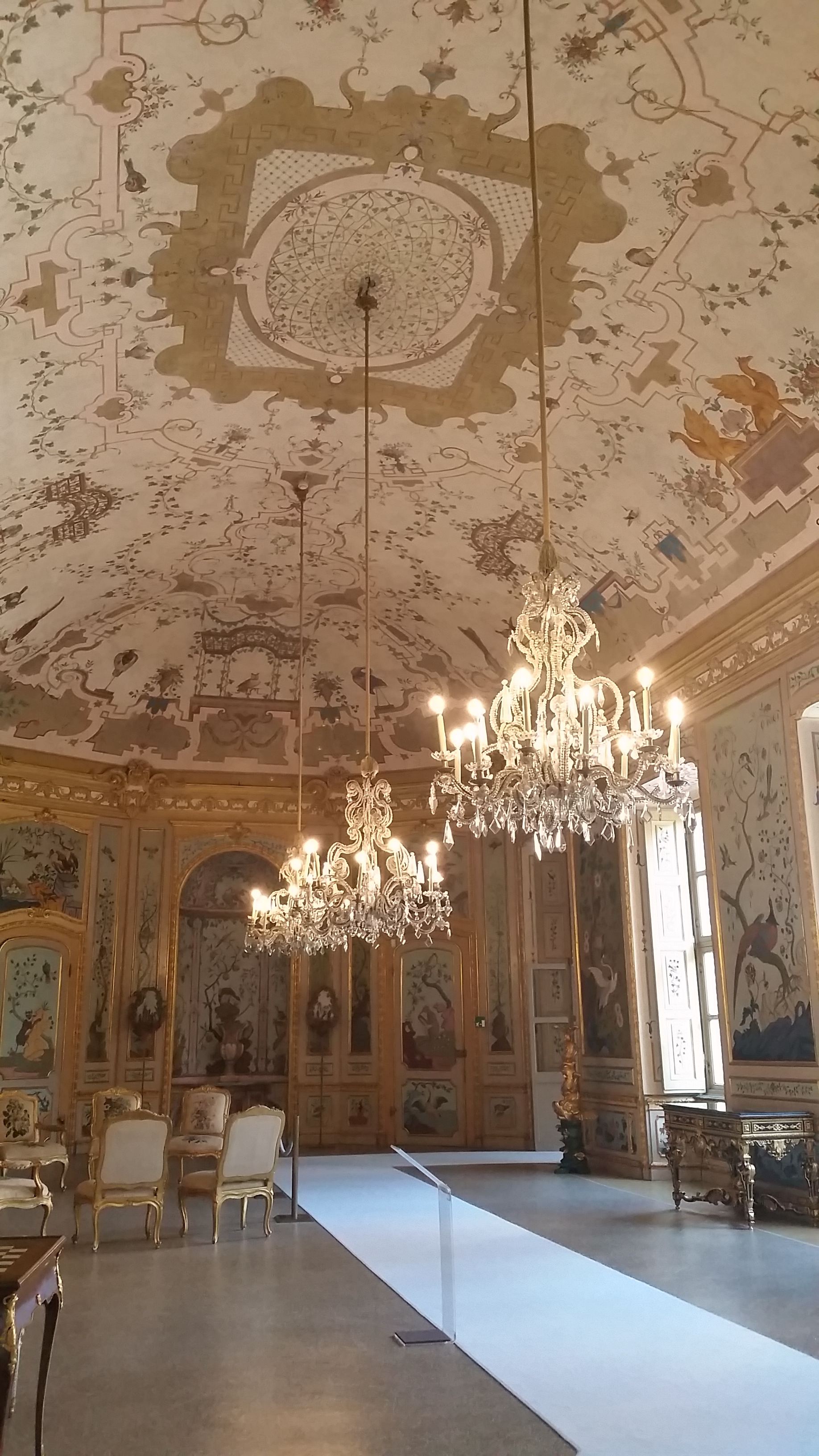 Sala da gioco con volta decorata a grottesche (Giovan Pietro Pozzo, 1765), dipinti alle pareti di Cristiano Wehrlin e arredo di cineserie e mobili da gioco, nella Palazzina di Stupinigi, Stupinigi, frazione di Nichelino, Piemonte, Italia.